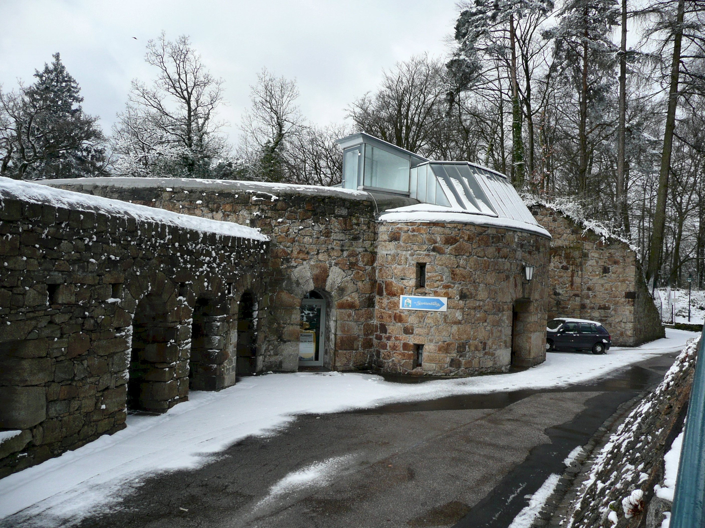 Turm I (Othilie) - Musikheim